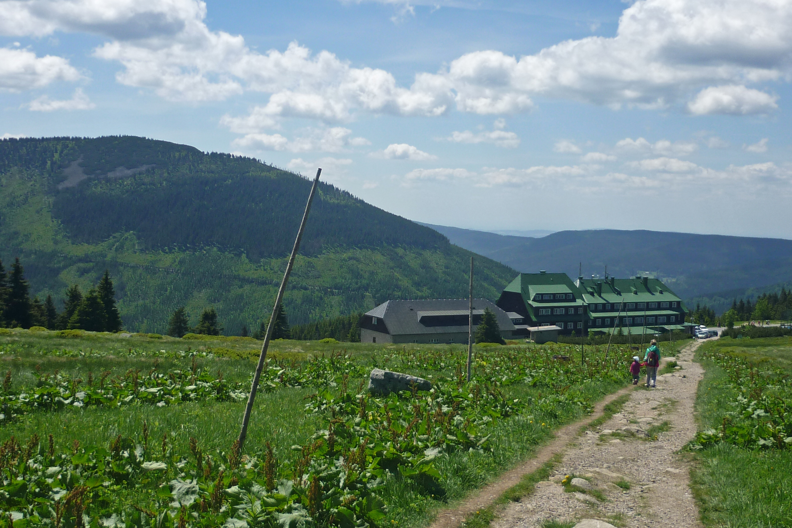 Erlebachbauden unterhalb des Spindlerpasses im Riesengebirge